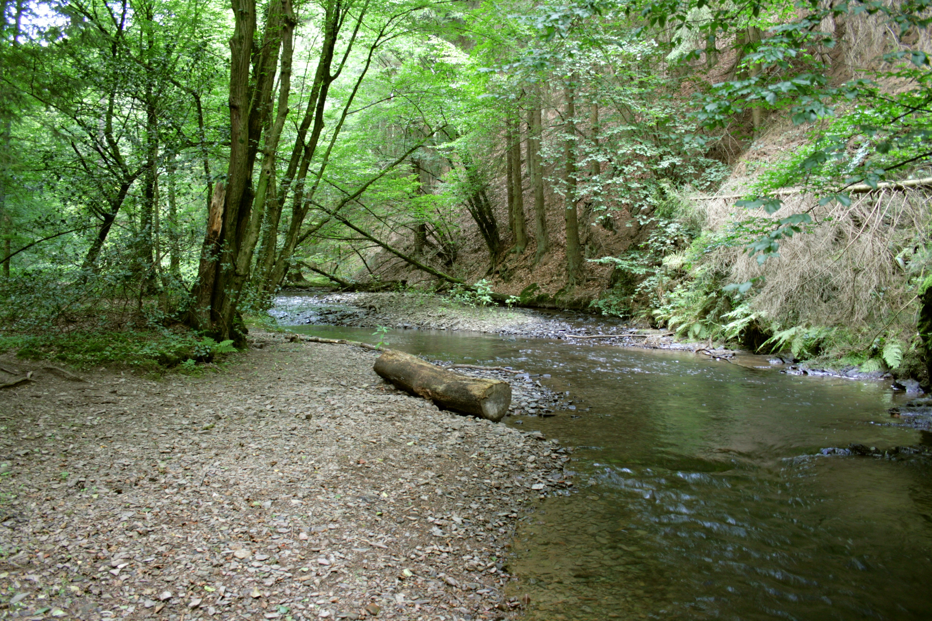 Eifgenbach in Burscheid, südlich der Eifgenburg